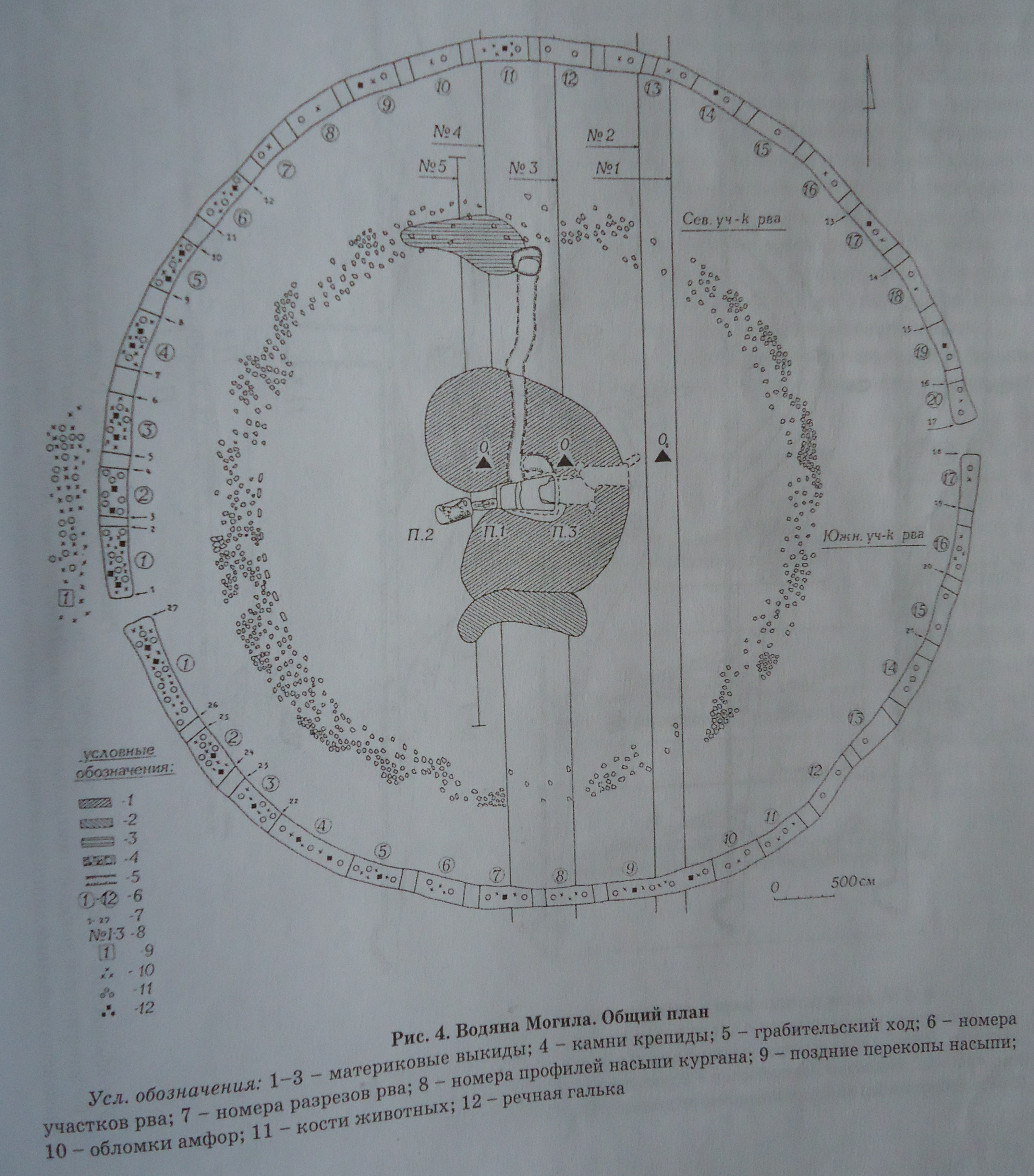 За Мозолевським Б.М.